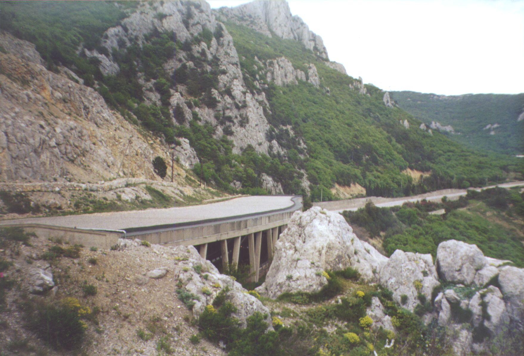 Kontraŭlavanga ŝirmilo sur aŭtomobila vojo ĉe Faros en Krimeo, Ukrainio, 2004. Mi, aŭtoro de la bildo, permesas al ĉiuj uzi ĝin kun ĉi tiuj kondiĉoj: La fonta bildo de ĉi tiu bildo estas ankaŭ en mia propra retpaĝaro [1]